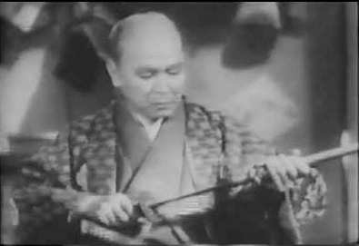 『血煙高田の馬場』、スチル写真、1937年